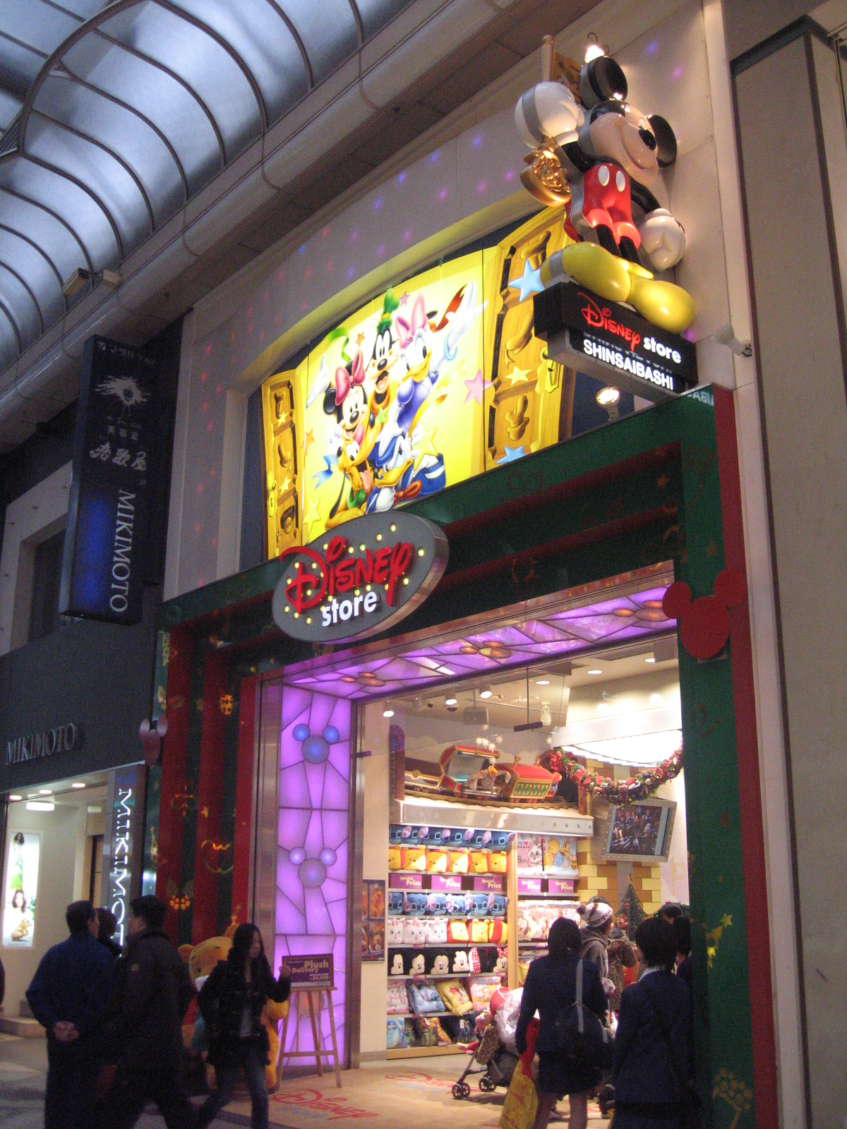 Disney Store at Shinsaibashi, Osaka, Kansai Region.